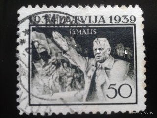 Почтовая марка 1939 г. "Президент Ульманис"